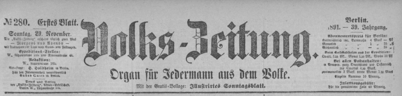 Titelkopf Volkszeitung 29.11.1891